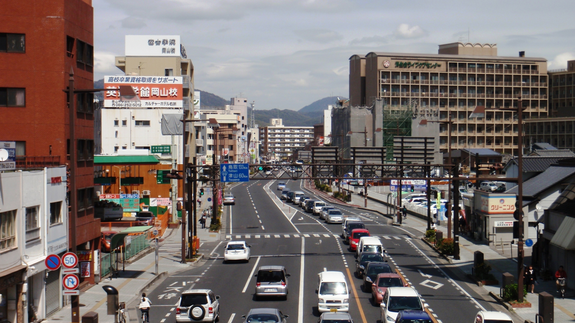 岡山県岡山市北区の国体筋の風景。起点の清心町交差点から見る。